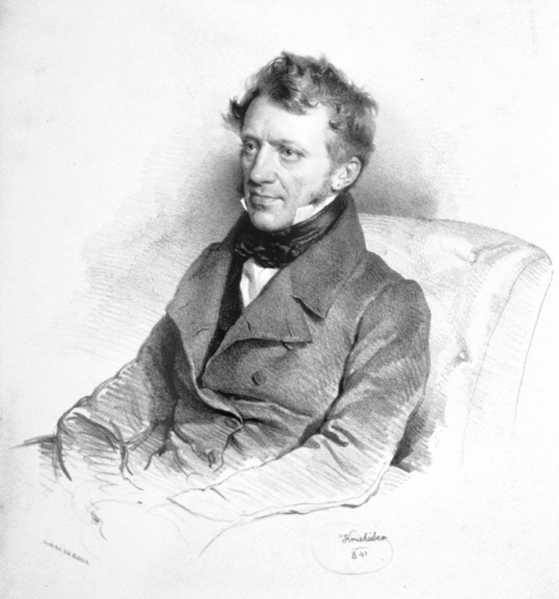 Franz Grillparzer; Porträtlithographie von Josef Kriehuber (1800-1876), 1841. Sammlung Peter Geymayer.